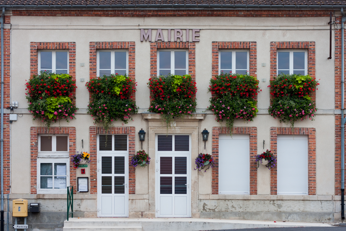 Village de Vert-Toulon, Champagne-Adernne. France.